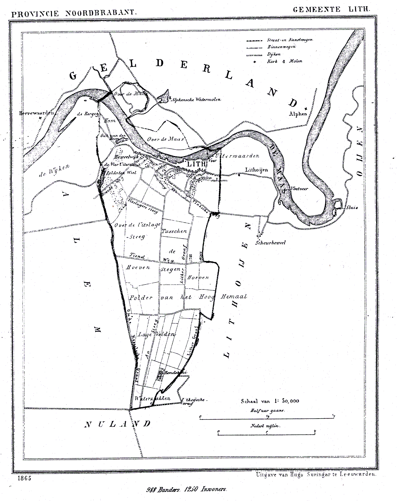 Nederland, Noord-Brabant, Gemeente Lith